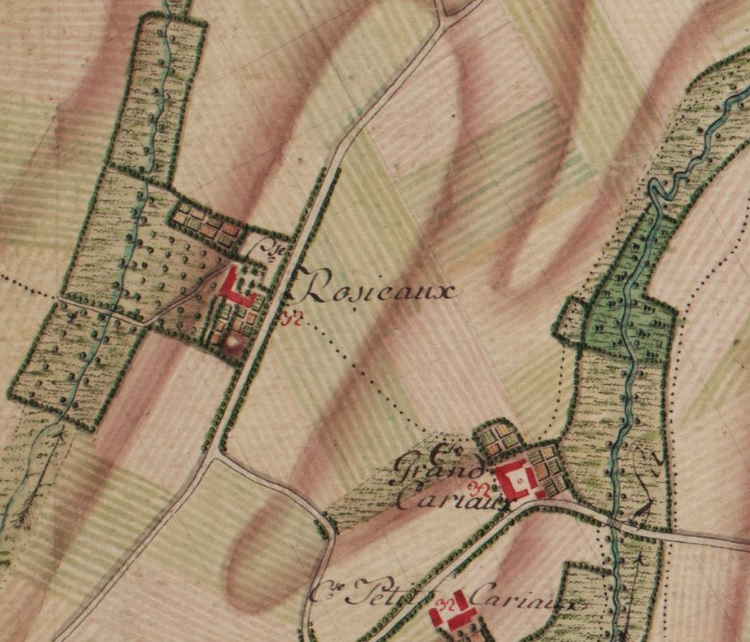 Extrait de la carte de Ferraris n° 135A